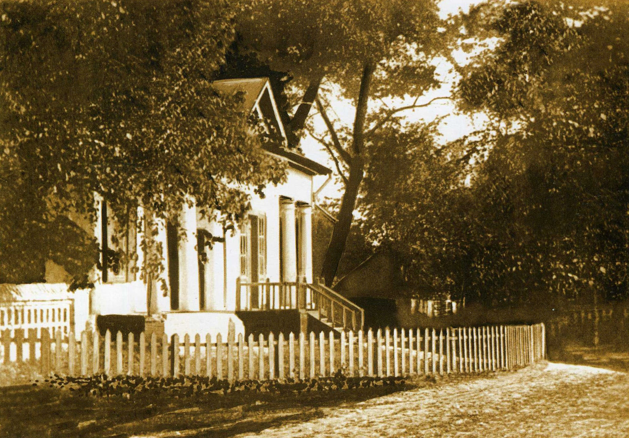 Головний будинок маєтку Линтварьових. Центральний вхід.